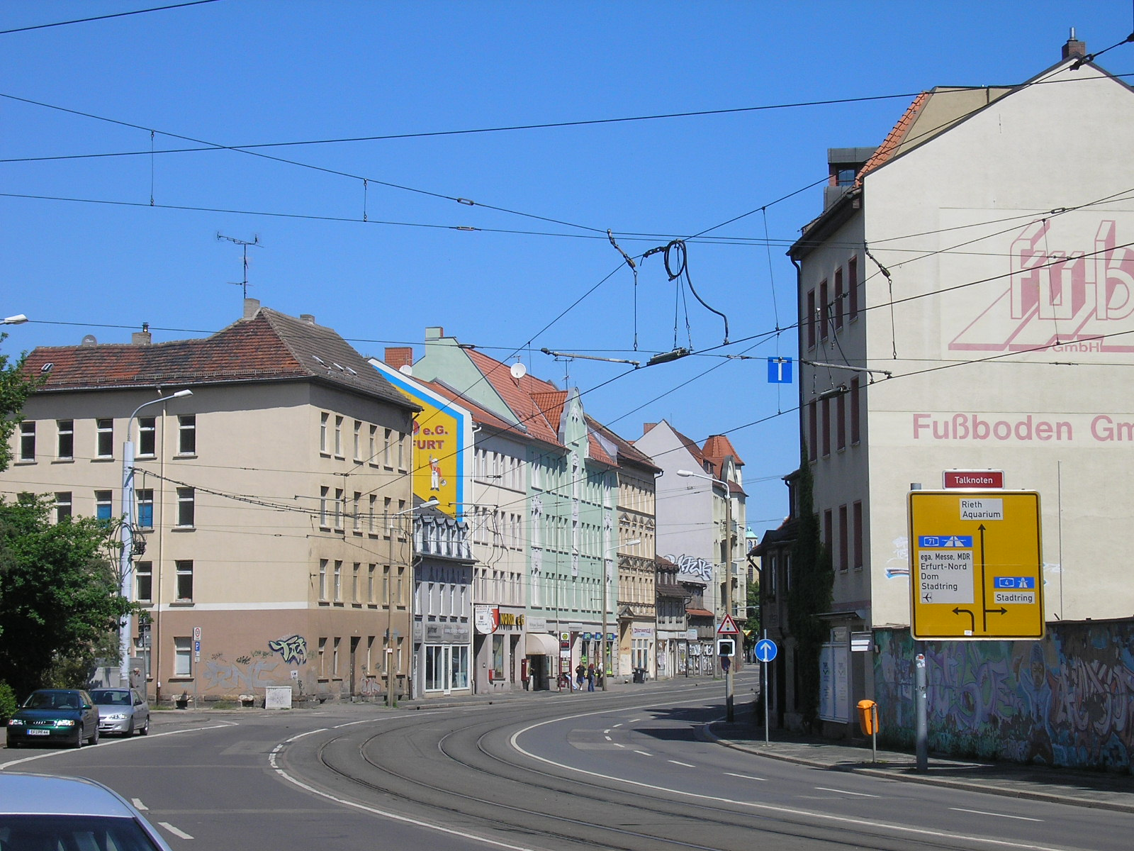 Der nördliche (äußere) Teil der Johannesstraße in Erfurt.